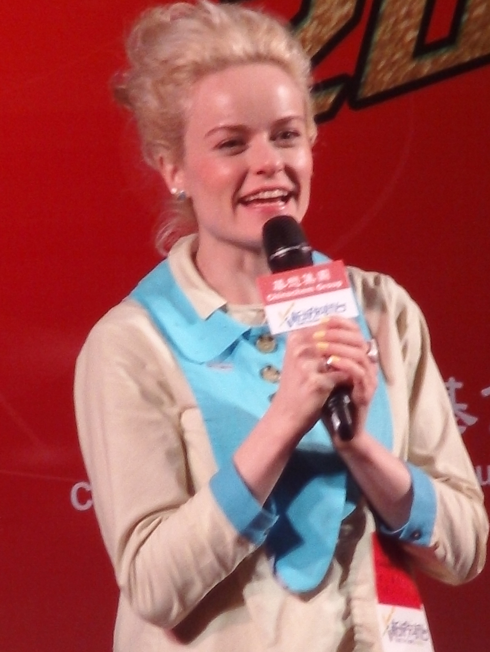 中文（香港）: 陳明恩的樣子